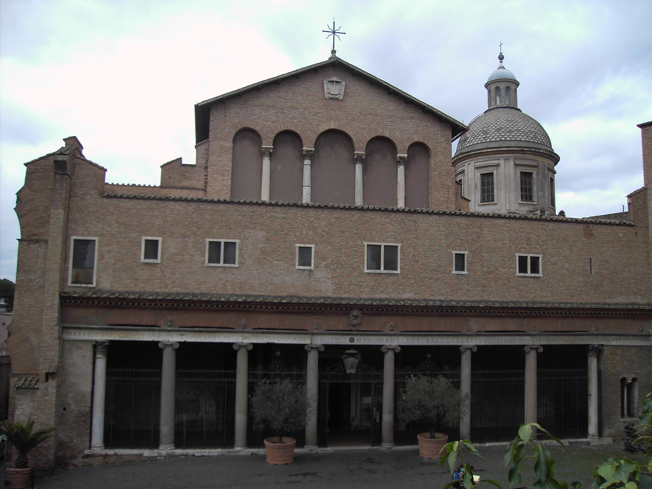 Roma, basilica dei santi Giovanni e Paolo al Celio.